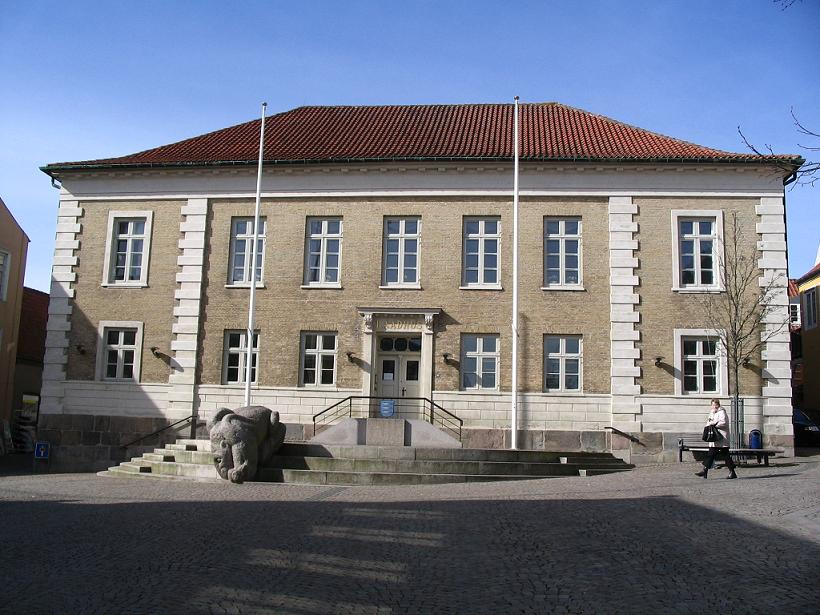 Rathaus von Aabenraa (Apenrade)